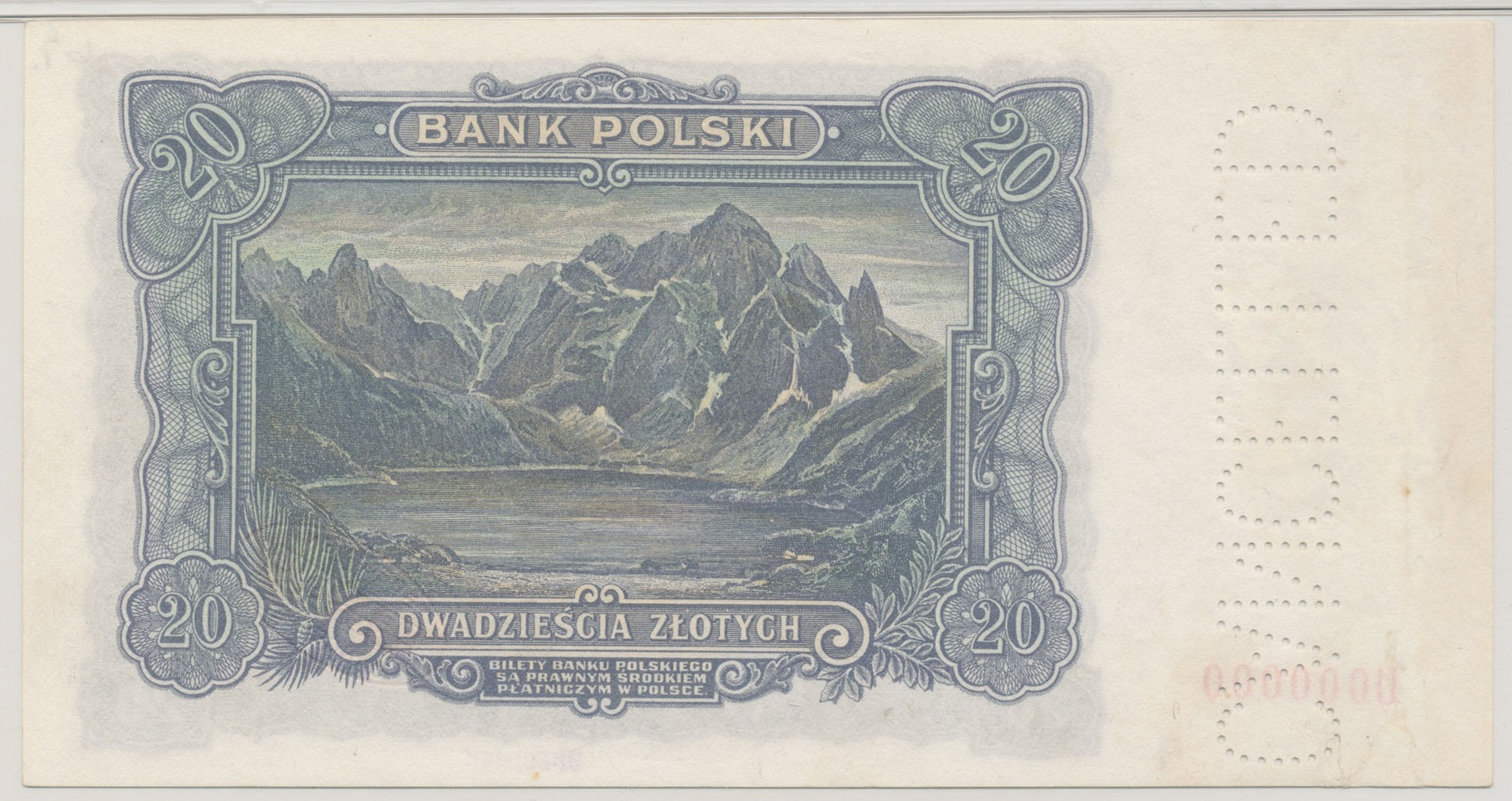 20 złotych 1928 rewers